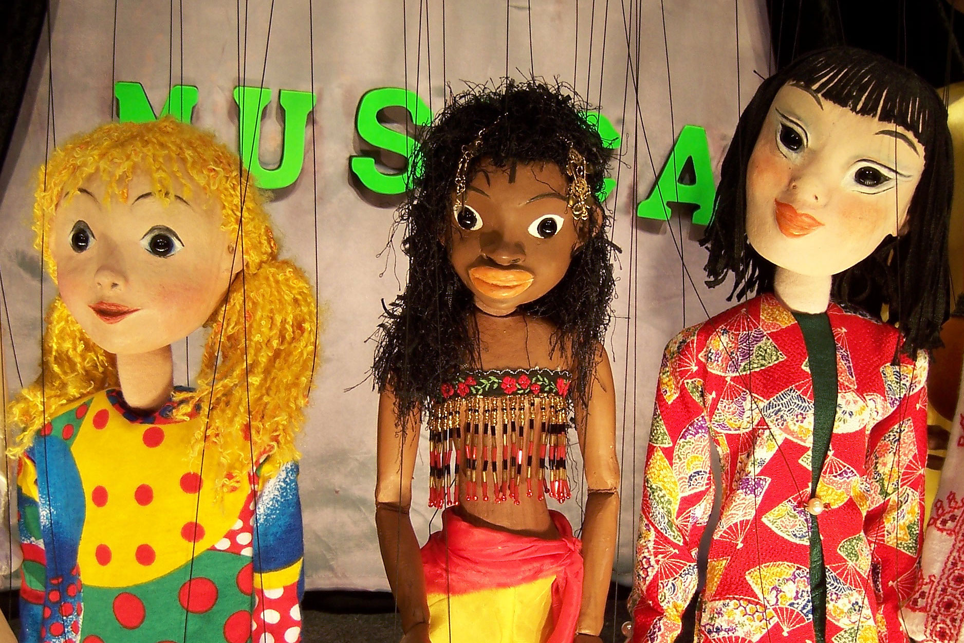 Marionetten Theater Plön, Schleswig-Holstein